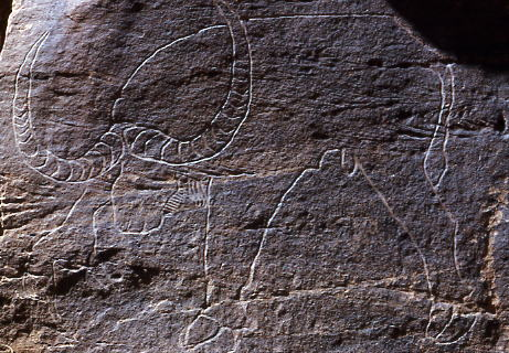 Gravure préhistorique du sud-oranais